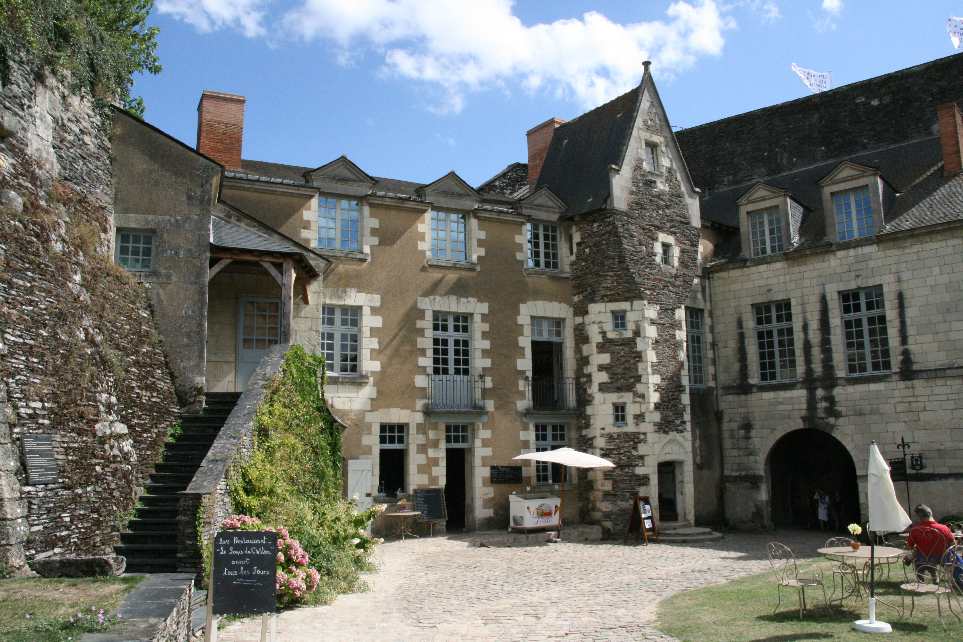 Le logis du gouverneur du château d'Angers, France. À l'époque où le château servait de prison, c'était le logement du gouverneur puis directeur de la prison.